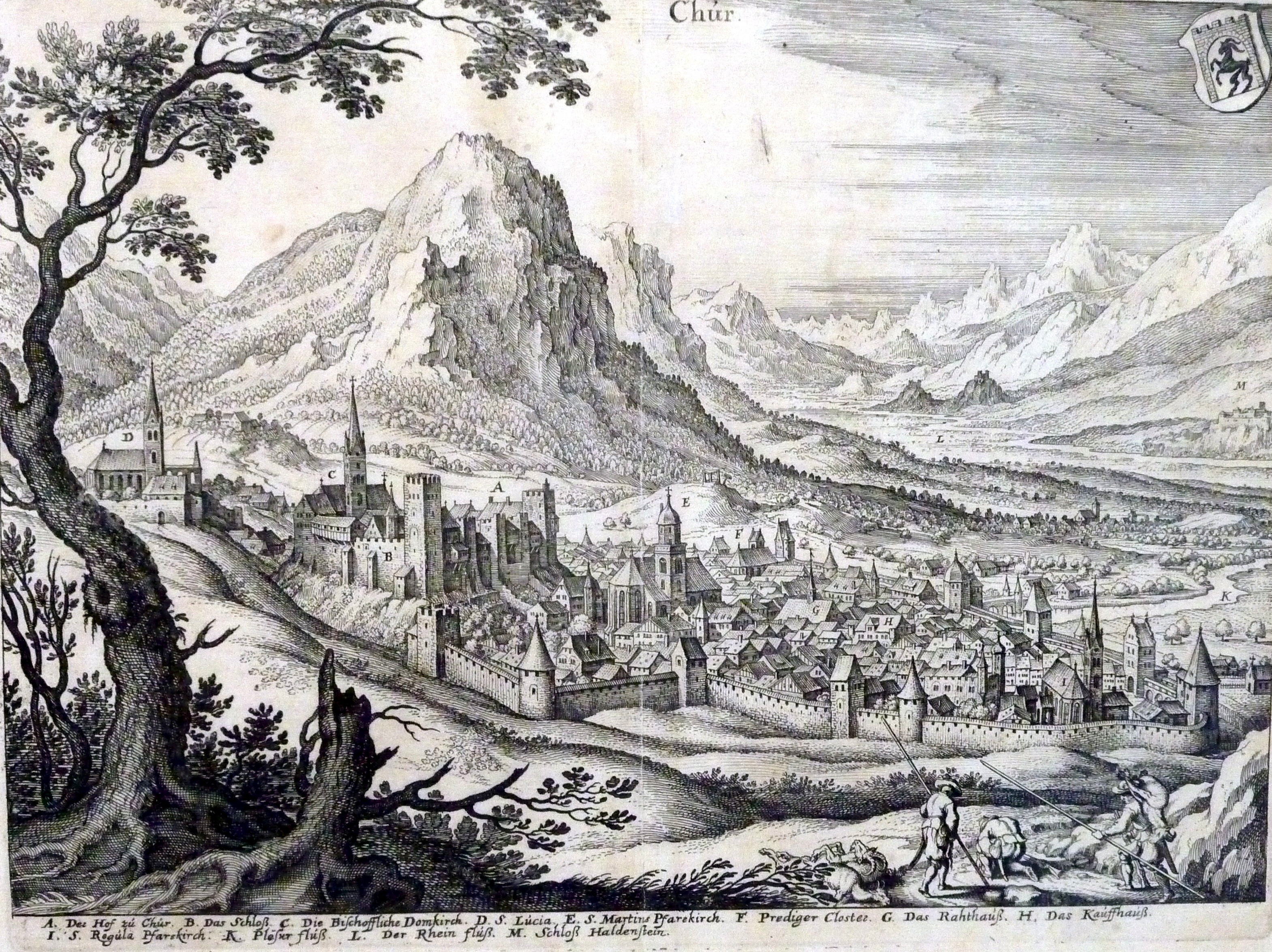 Chur 1655, Kupferstich von Matthäus Merian; 10,1 x 14,9cm